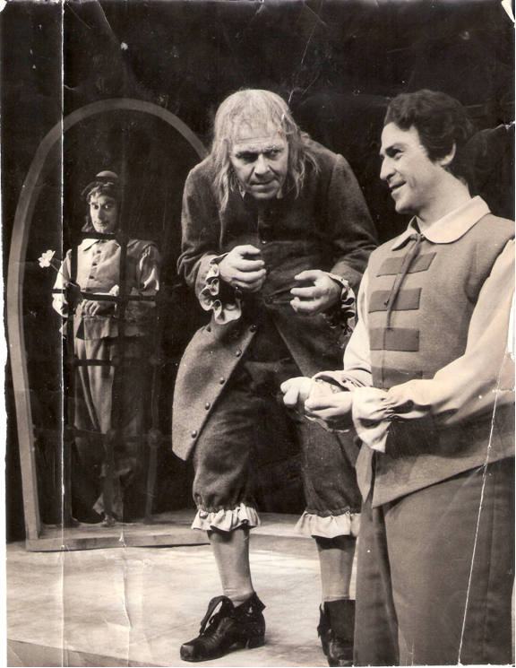 נתן כוגן ואברהם בן יוסף(2)